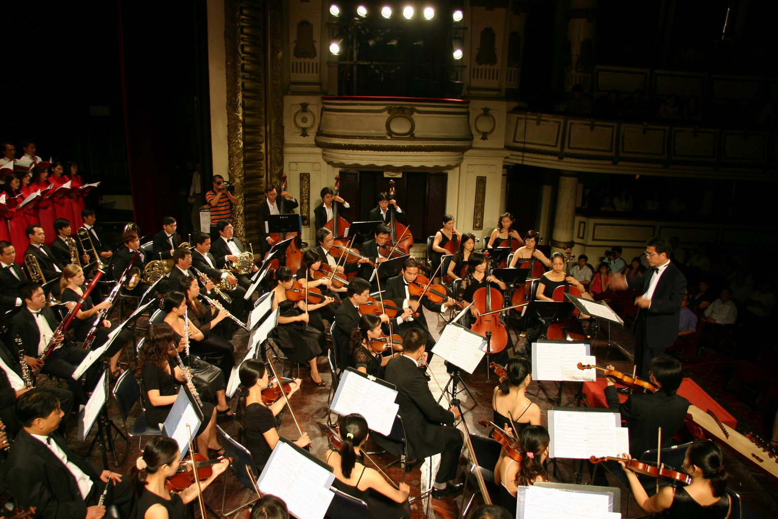 Nhạc sĩ Đặng Hữu Phúc, chỉ huy Dàn nhạc giao hưởng và Hợp xướng Nhà hát Nhạc Vũ kịch Việt Nam biểu diễn bản hợp xướng "Đất nước" ngày 1 tháng 9 năm 2009 tại Nhà hát lớn Hà Nội